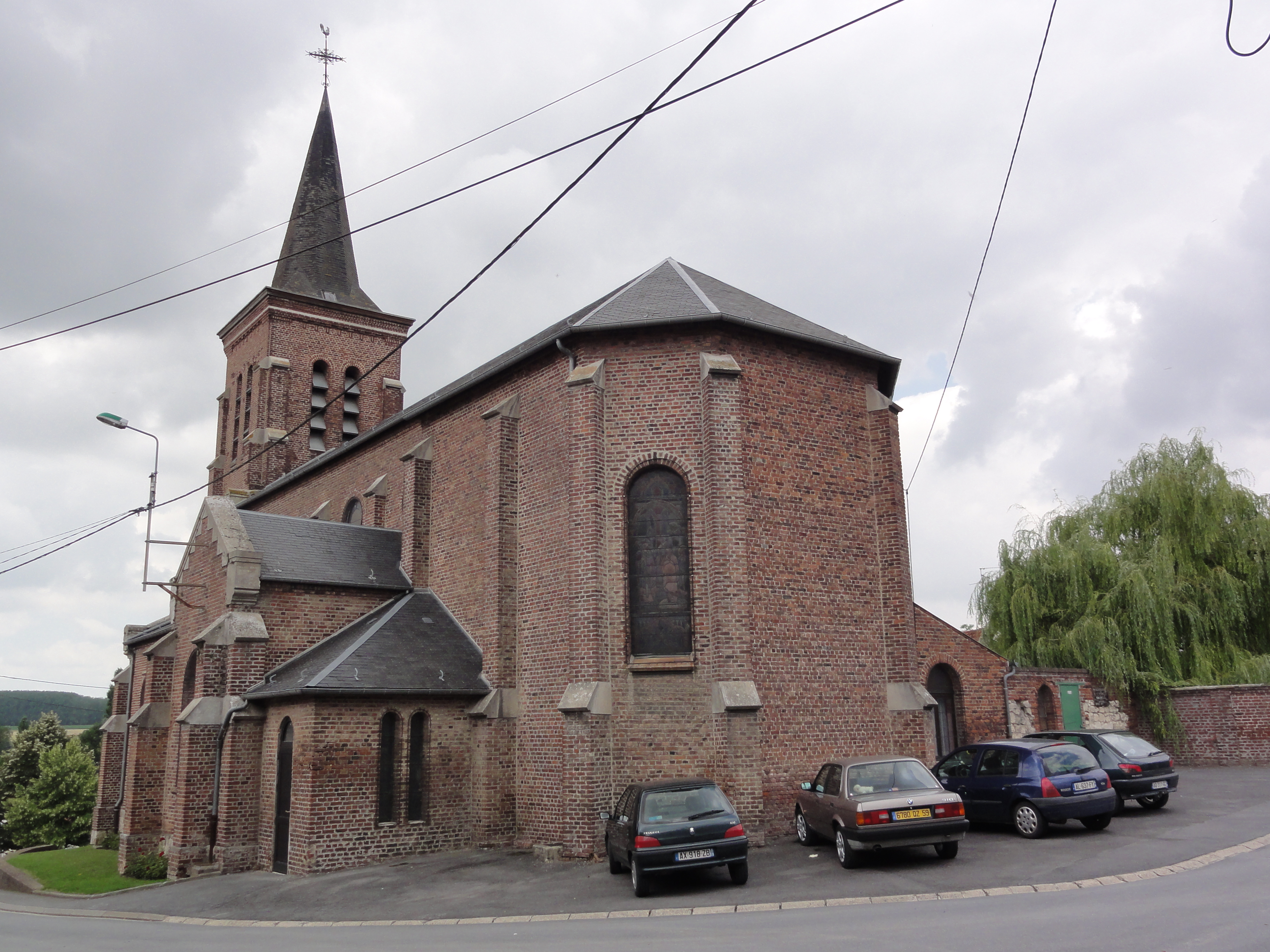 Monchaux-sur-Écaillon (Nord, Fr) église, chevet